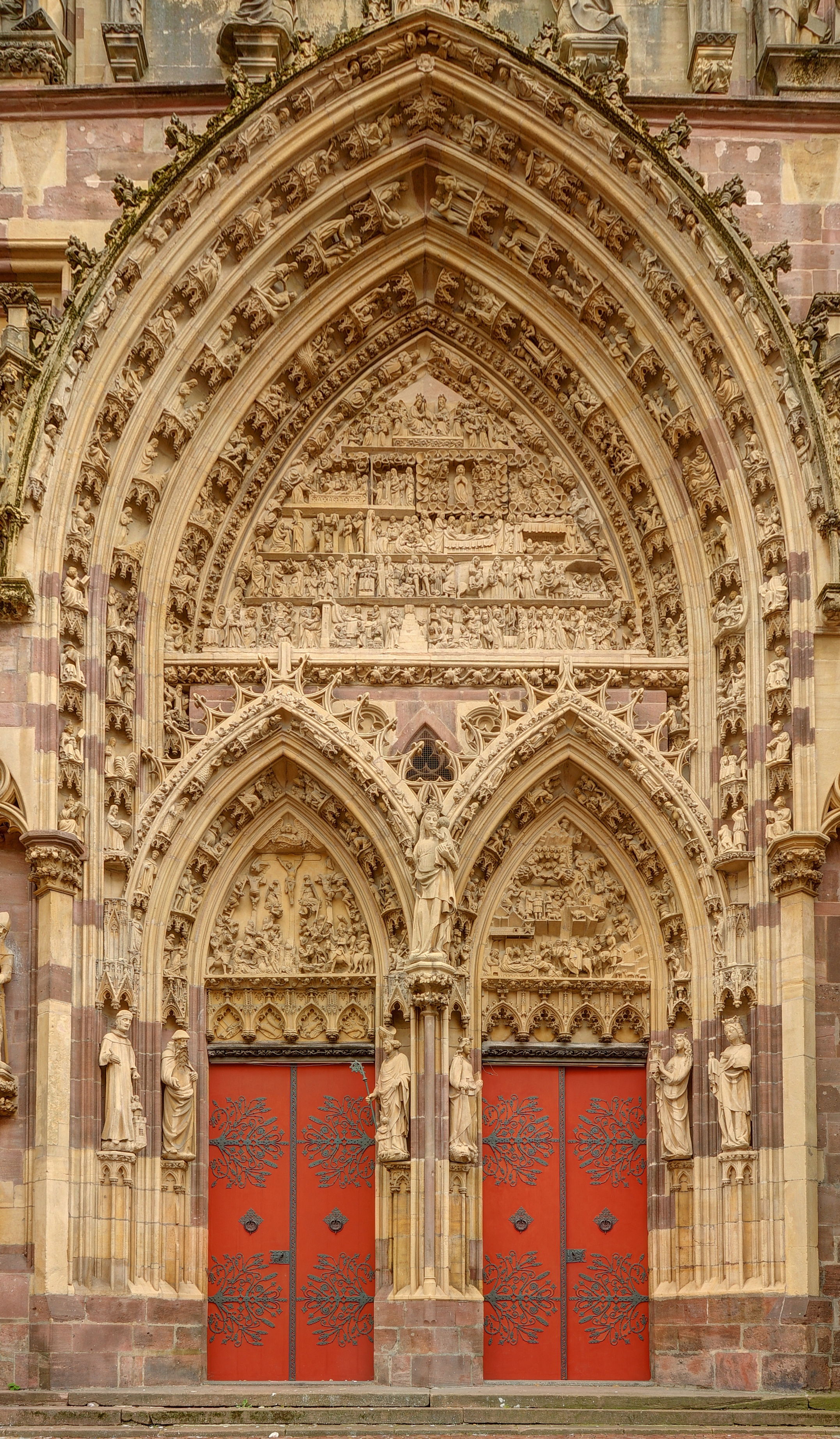 Collégiale Saint-Thiébaut de Thann (HDR), classée Monument Historique sous le n°PA00085696. Détails des bas-reliefs de l'entrée principale.